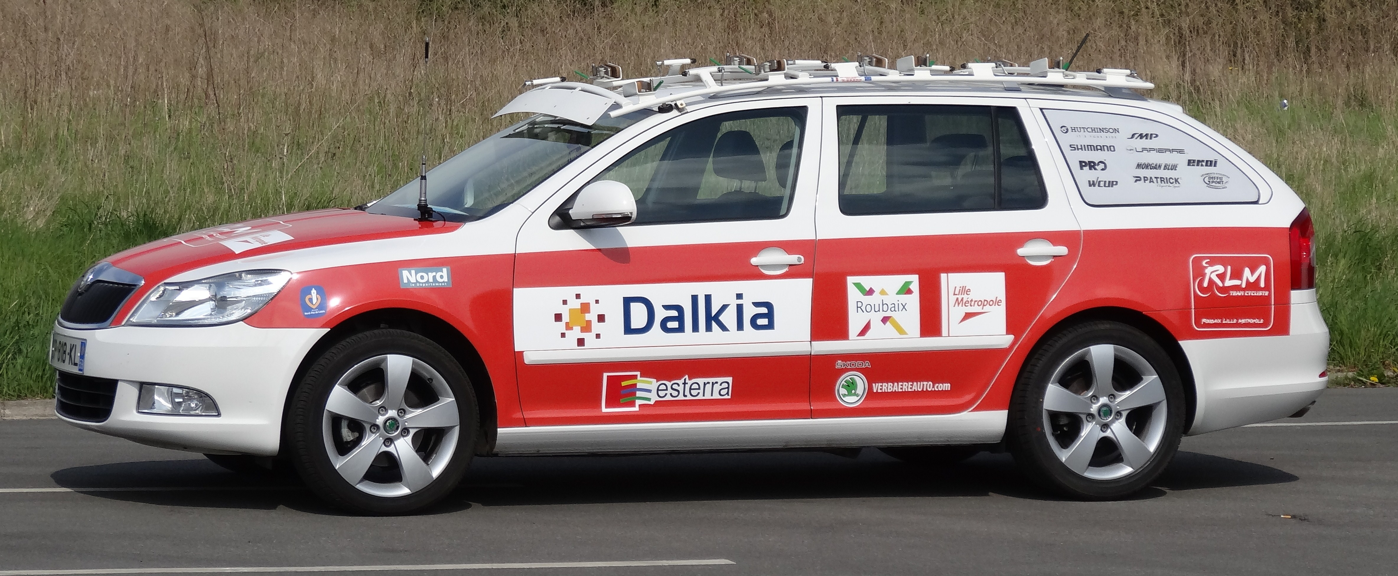 Reportage photographique réalisé le mercredi 1er mai 2013 à l'arrivée de la première étape de l'édition 2013 des Quatre jours de Dunkerque à Courrières, Pas-de-Calais, Nord-Pas-de-Calais, France, dans le bassin minier du Nord-Pas-de-Calais. L'arrivée a eu lieu à côté du carreau de la fosse no 1 de la Compagnie des mines de Courrières, première fosse à produire dans le Pas-de-Calais hors Boulonnais. Le dossier photographique montre les véhicules des équipes cyclistes, l'arrivée des cyclistes, et la remise des prix.